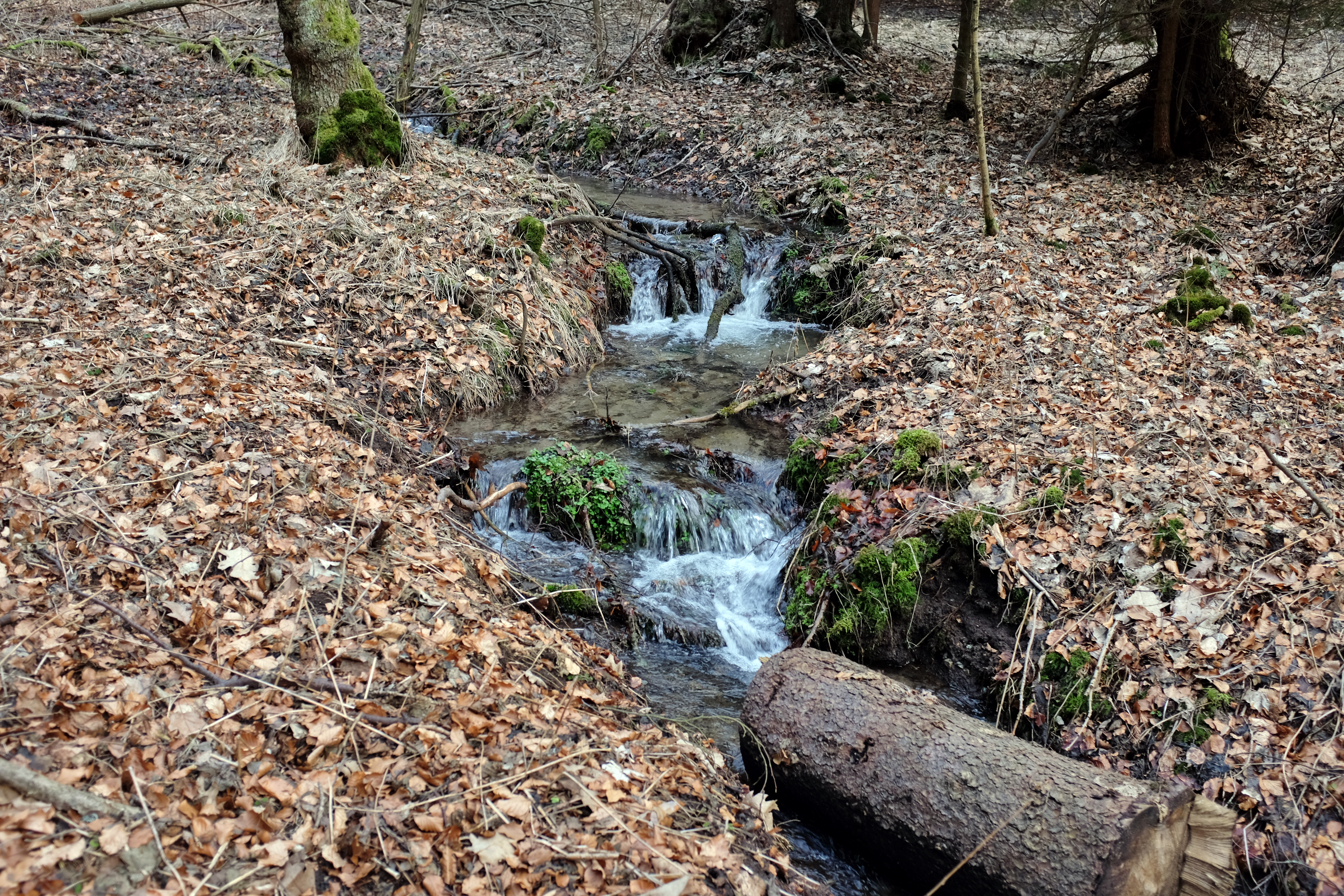 Potok Tisová ve Slavkovském lese nad obcí Březová